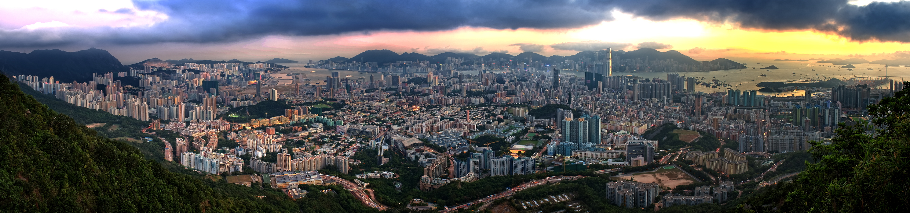 Kowloon Panorama (2009) 九龍半島全景照片 (2009年)